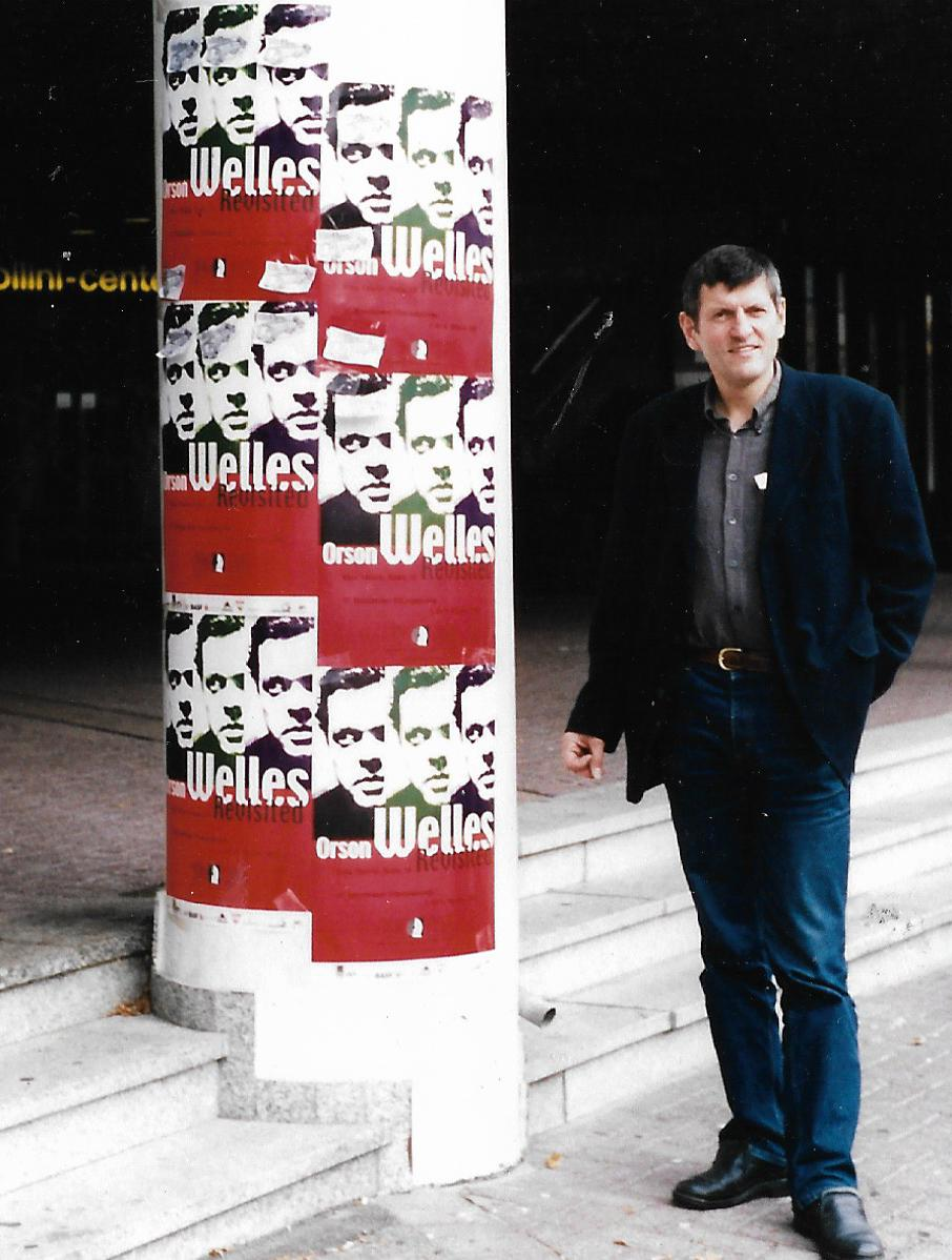 Deitsch: Second Welles-Conferece in Mannheim